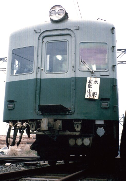 現役当時のja:南海1521系電車 水軒にて